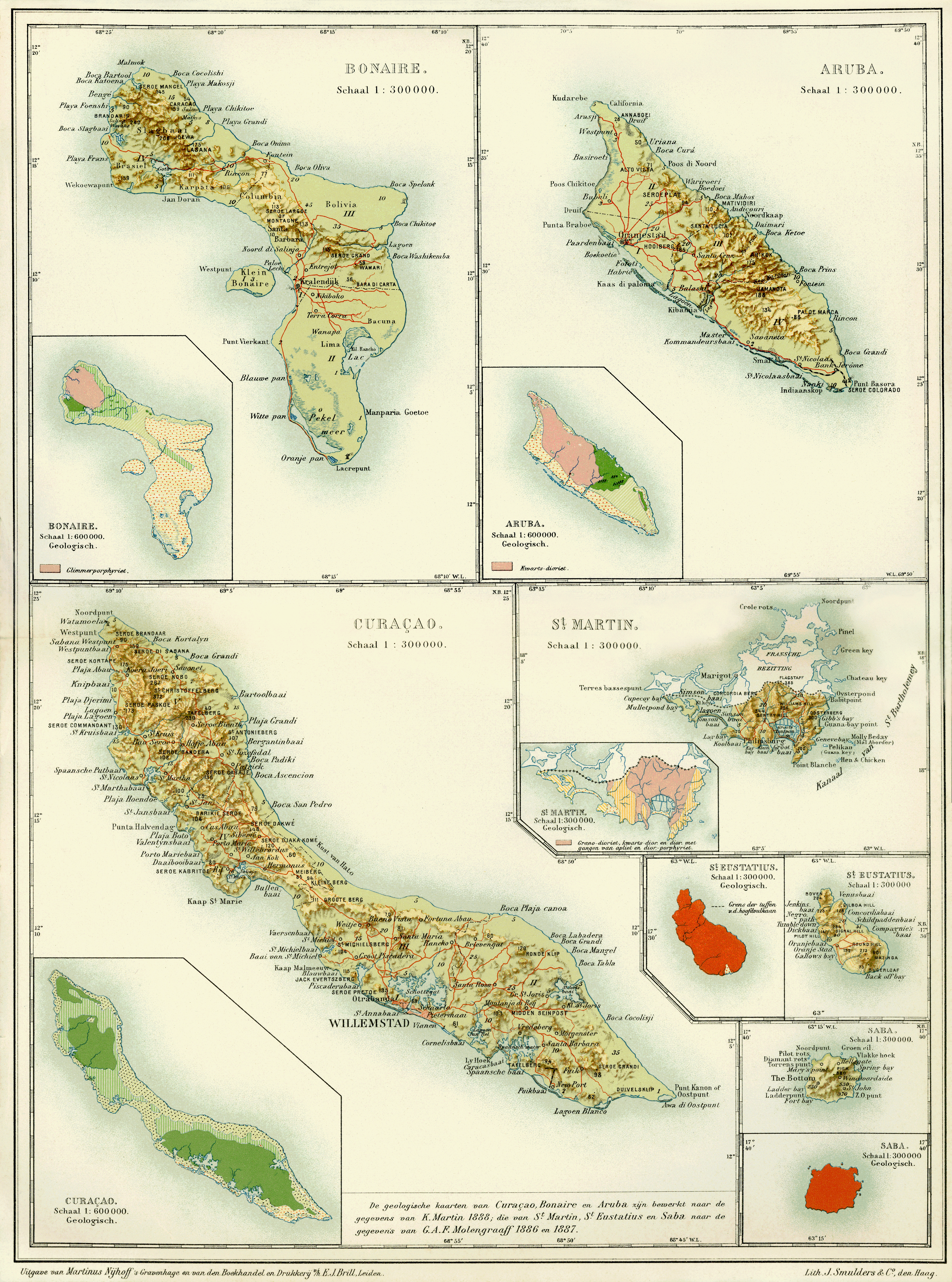 Karte aus der Enzyklopädie der Niederländischen Antillen.